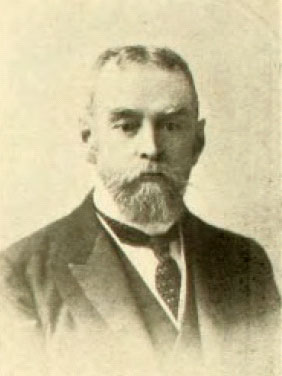 Luis Claro Solar (Santiago, 20 de enero de 1857 - Santiago, 19 de julio de 1945) fue un destacado abogado, político y jurista chileno. Fue Senador de la República de Chile y Presidente del Senado. Su mayor obra fue el tratado Explicaciones de Derecho Civil Chileno y Comparado compuesto por quince tomos. Fue tambien miembro del Cuerpo de Bomberos de Santiago, llegando a ser su Superintendente.